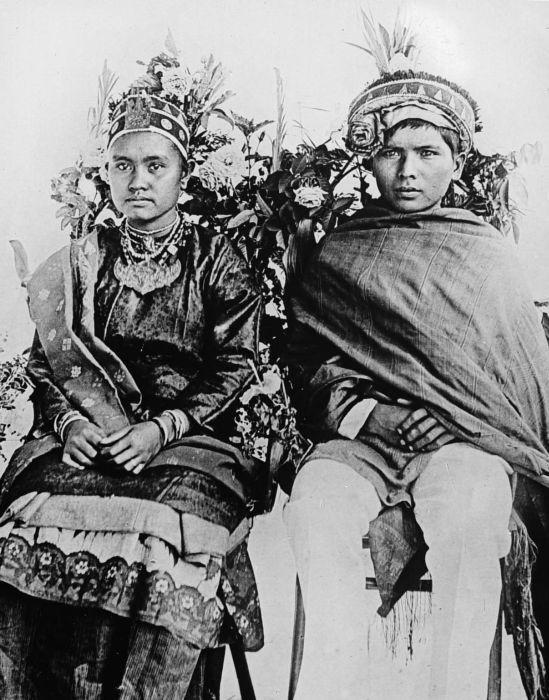 foto Pasangan Pengantin di Pakantan, Mandailing Natal, Sumatera Utara